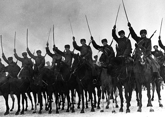 Контрнаступление советских войск под Москвой (1941)